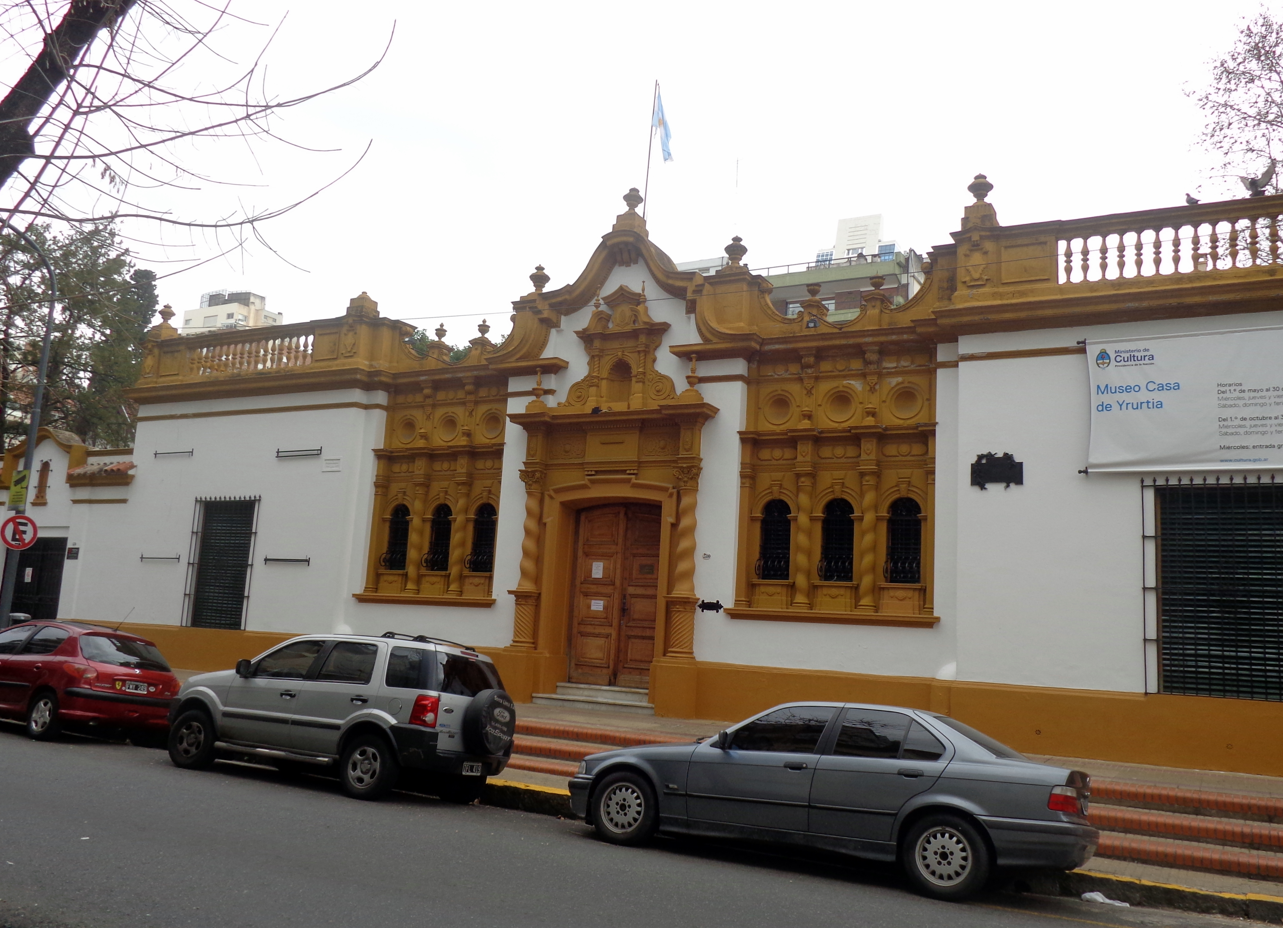 Fachada de la casa en la calle O'Higgins y Blanco Encala